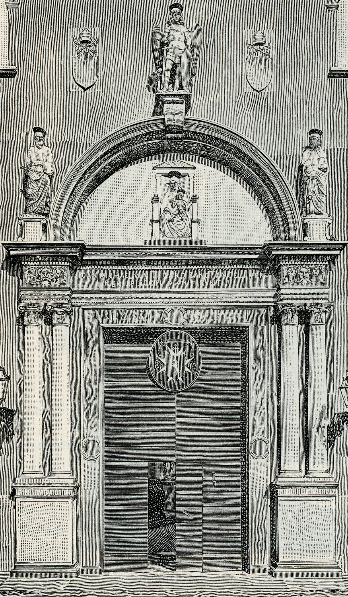 Verona: porta del Palazzo Vescovile (xilografia).